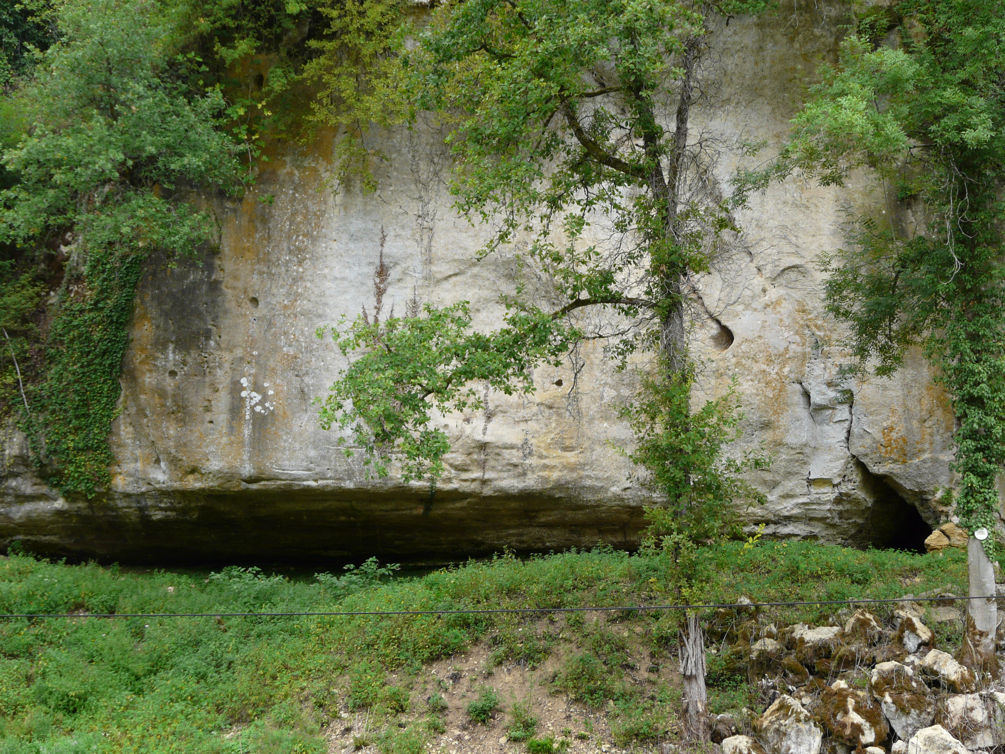 L'abri Castanet, site préhistorique sur la commune de Sergeac, dans le vallon de Castel Merle, Dordogne, France. .